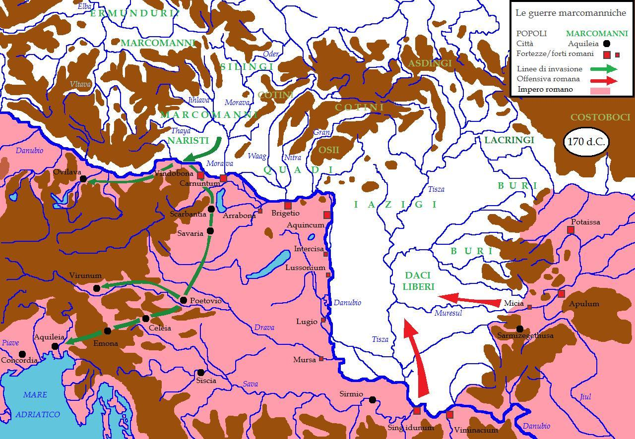 Position of Vienna corrected (40 km direction EastSouthEast)